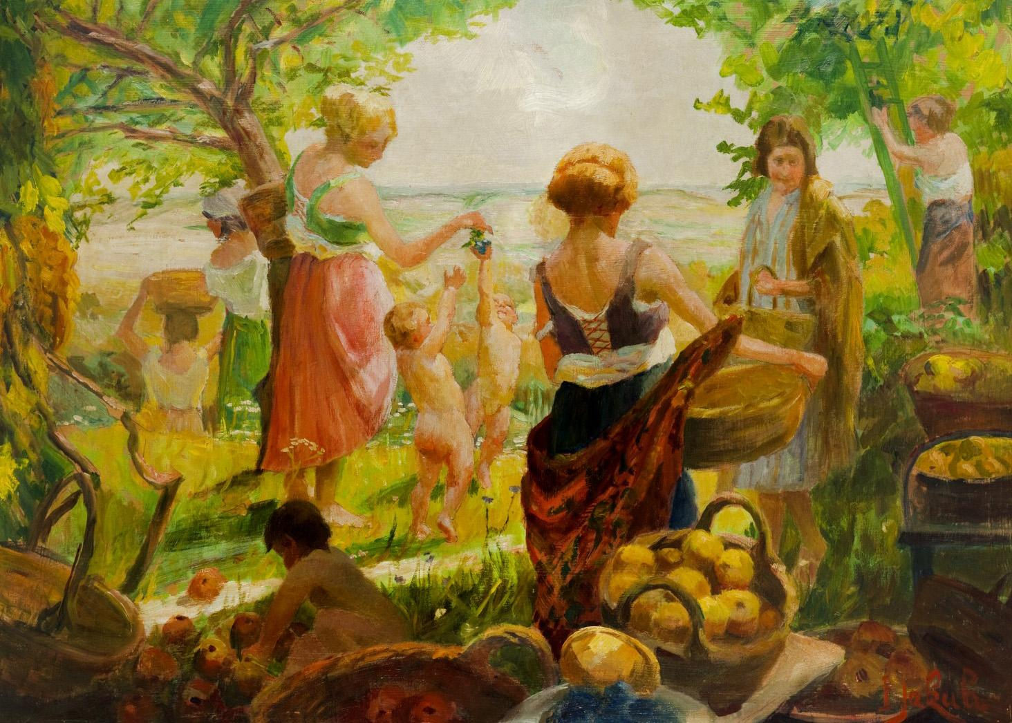 Obsternte, rechts unten signiert: F. Jakub, Öl auf Sperrholz, 55 x 75 cm